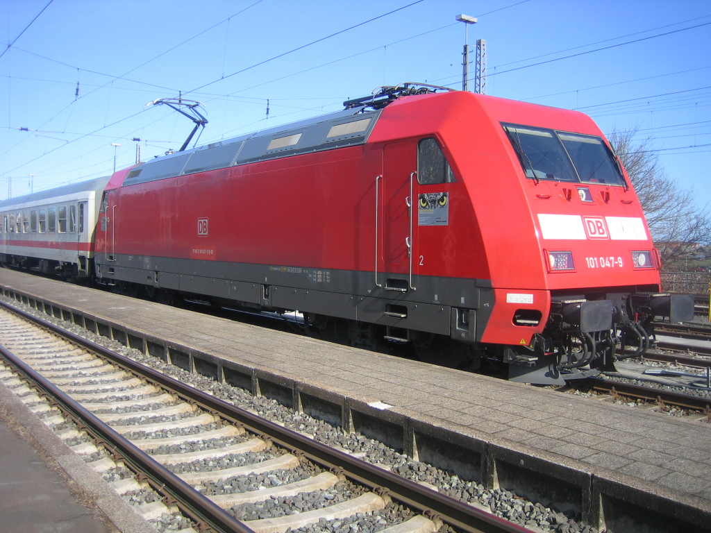 101 047 - Lokomotive der Deutschen Bahn als Erprobungsträger mit LED Scheinwerfer